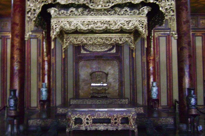 Ngai vàng nơi nhà Vua thiết triều trong Điện Thái Hoà, Hoàng thành Huế